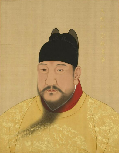 中文（中国大陆）: 作者已经去世超过200年，作品已经进入公有领域。